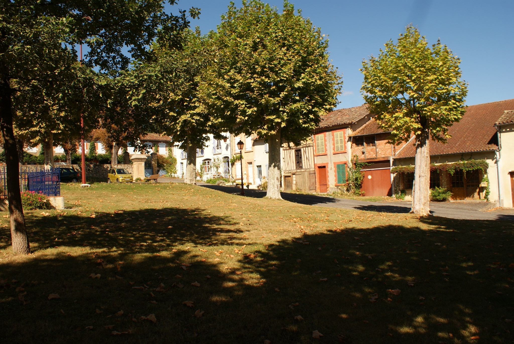 Huizen en mariabeeld aan plein in Villefranche d'Astarach.